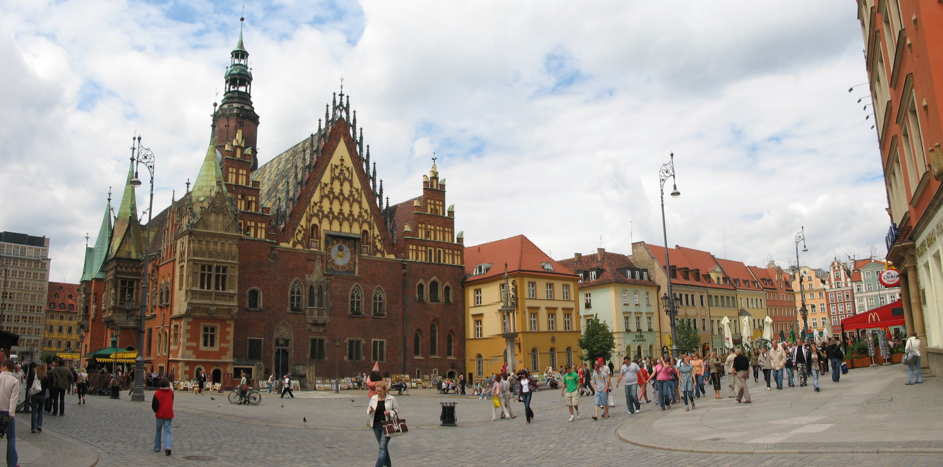 Wrocław - Ratusz oraz kamienice na Rynku